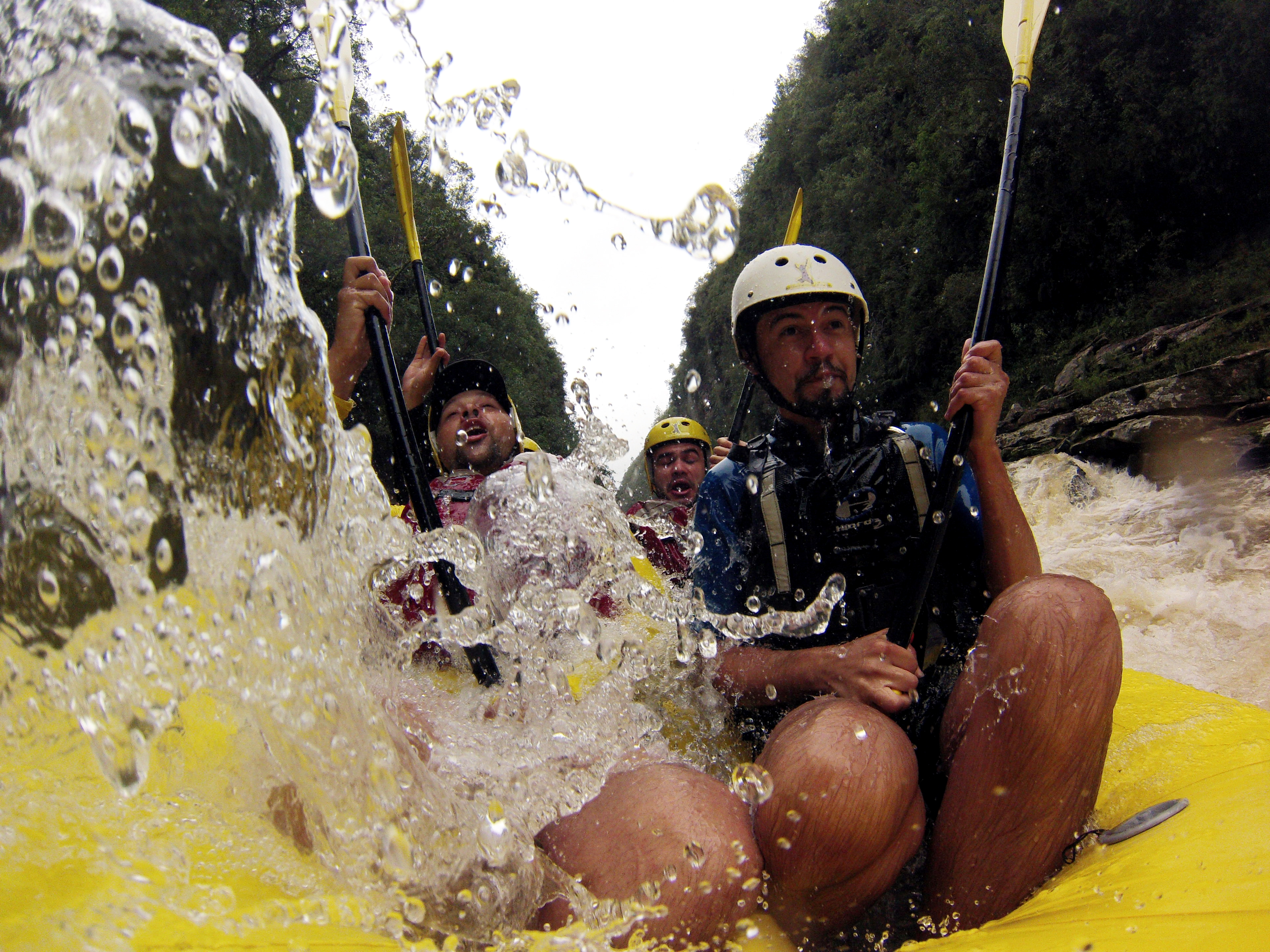 Trecho do cânion do rio Jaguariaíva, chamado de Encanadão, na borda Leste do Parque Estadual do Cerrado. Acessado somente por atividade de rafting, muito divertida com a empresa Adventurous Friends Turismo & Aventura.